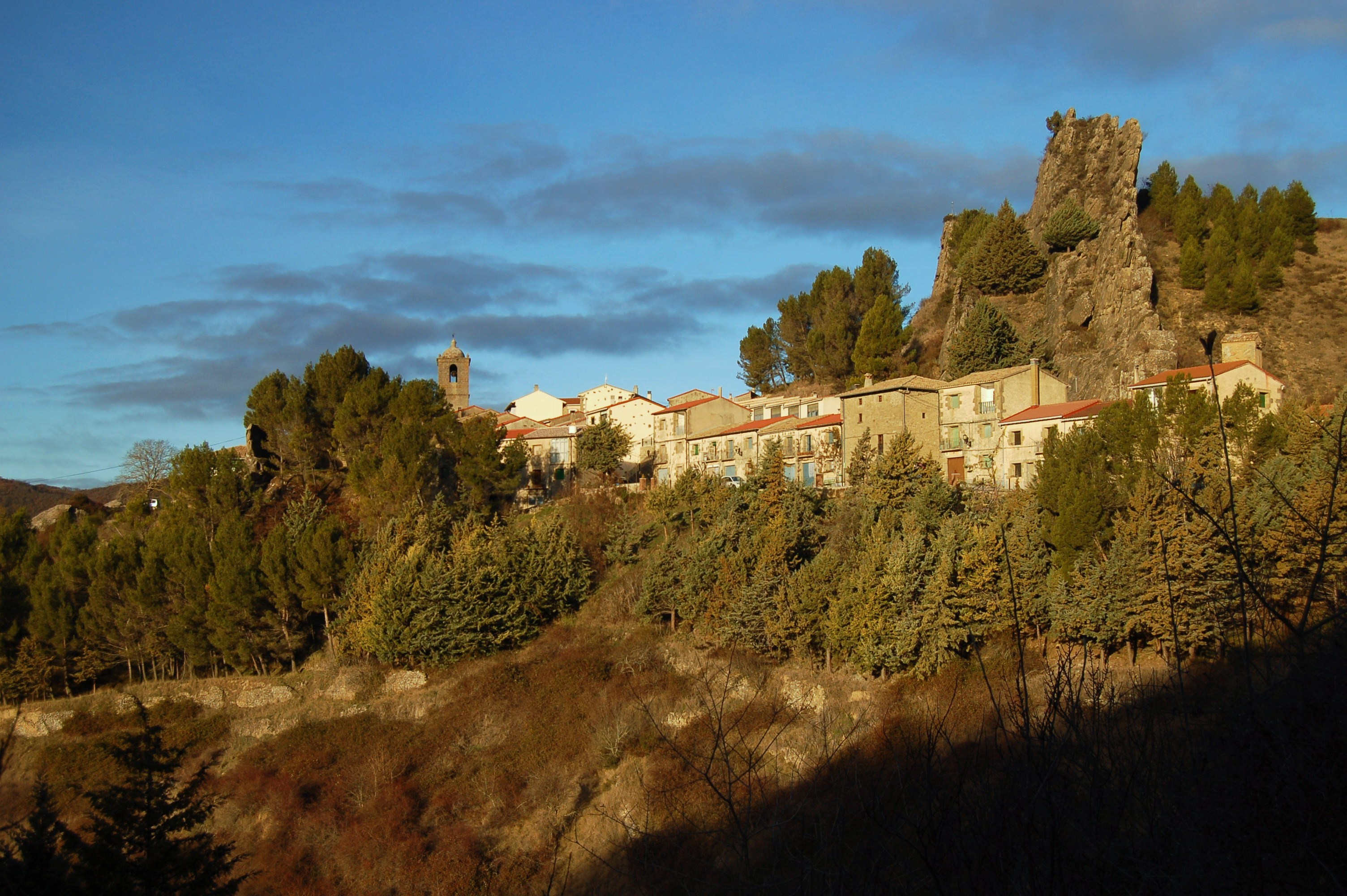 Petilla de Aragón